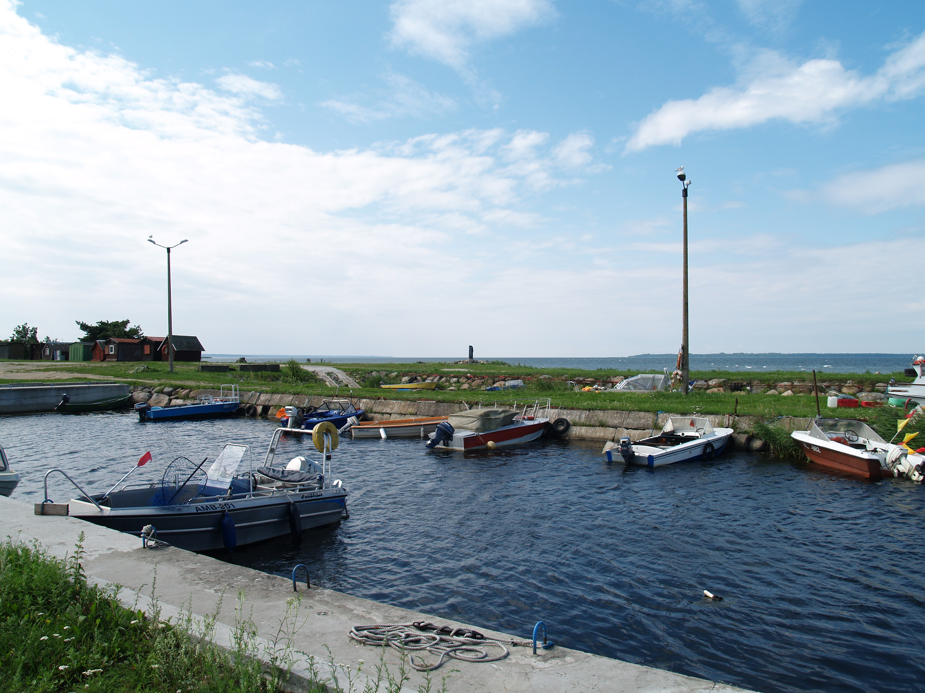 Kurkse sadam. Taamal paistab mälestusmärk hukkunud rahuvalvajatele.